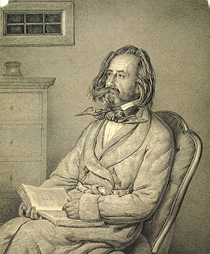 Поджио Александр Викторович